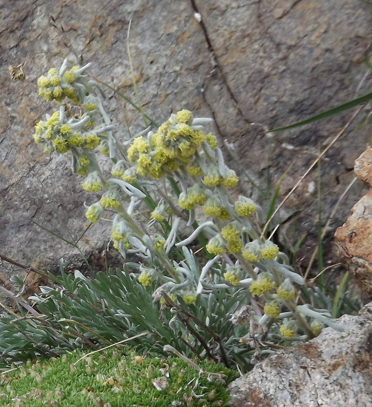 Génépi laineux (Artemisia eriantha). Synonymes : génépi mâle, génépi bourru, génépi à fleurs cotonneuses.